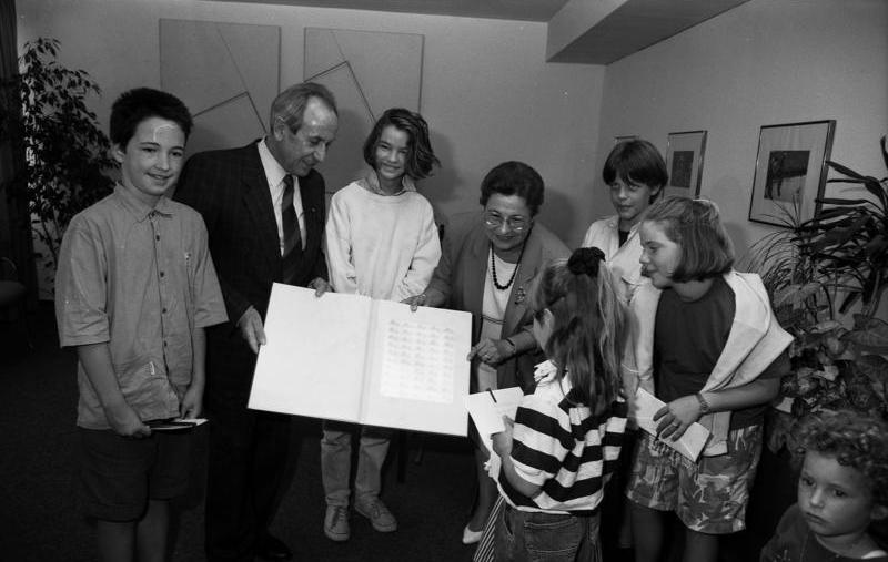 Bonn, 9. August 1989 Der Parlamentarische Staatssekretär beim Bundesminister für Post und Telekommunikation, Wilhelm Rawe, überreichte der Bundesministerin für Jungend, Familie, Frauen und Gesundheit, Prof. Ursula Lehr, ein Album mit den ersten Drucken der Sonderbriefmarke "Kinder gehören dazu".